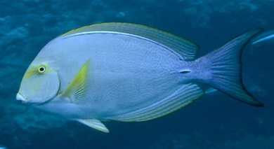 recorte de File:Poisson indetermine 2.jpg